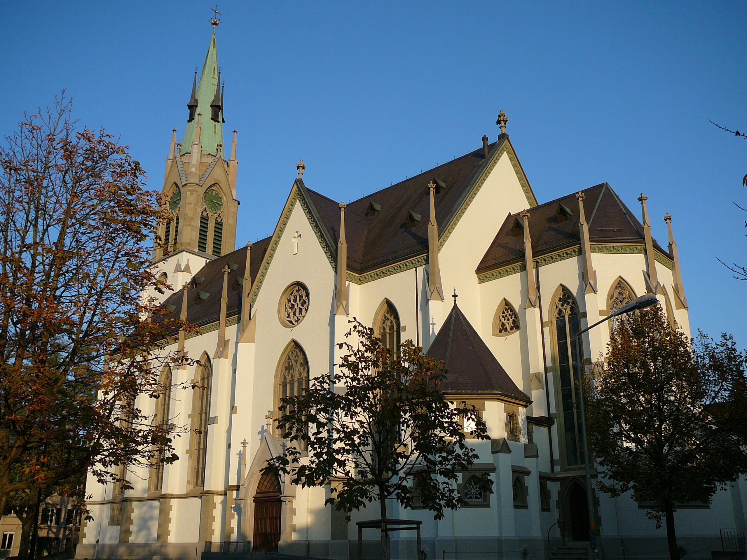 Römisch-katholische Pfarrkirche St. Peter und Paul Winterthur-Neuwiesen, Aussenansicht